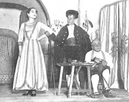 Margarita Xirgu, José Cañizares y Alejandro Máximo en una escena de la obra de teatro La zapatera prodigiosa, de Federico García Lorca